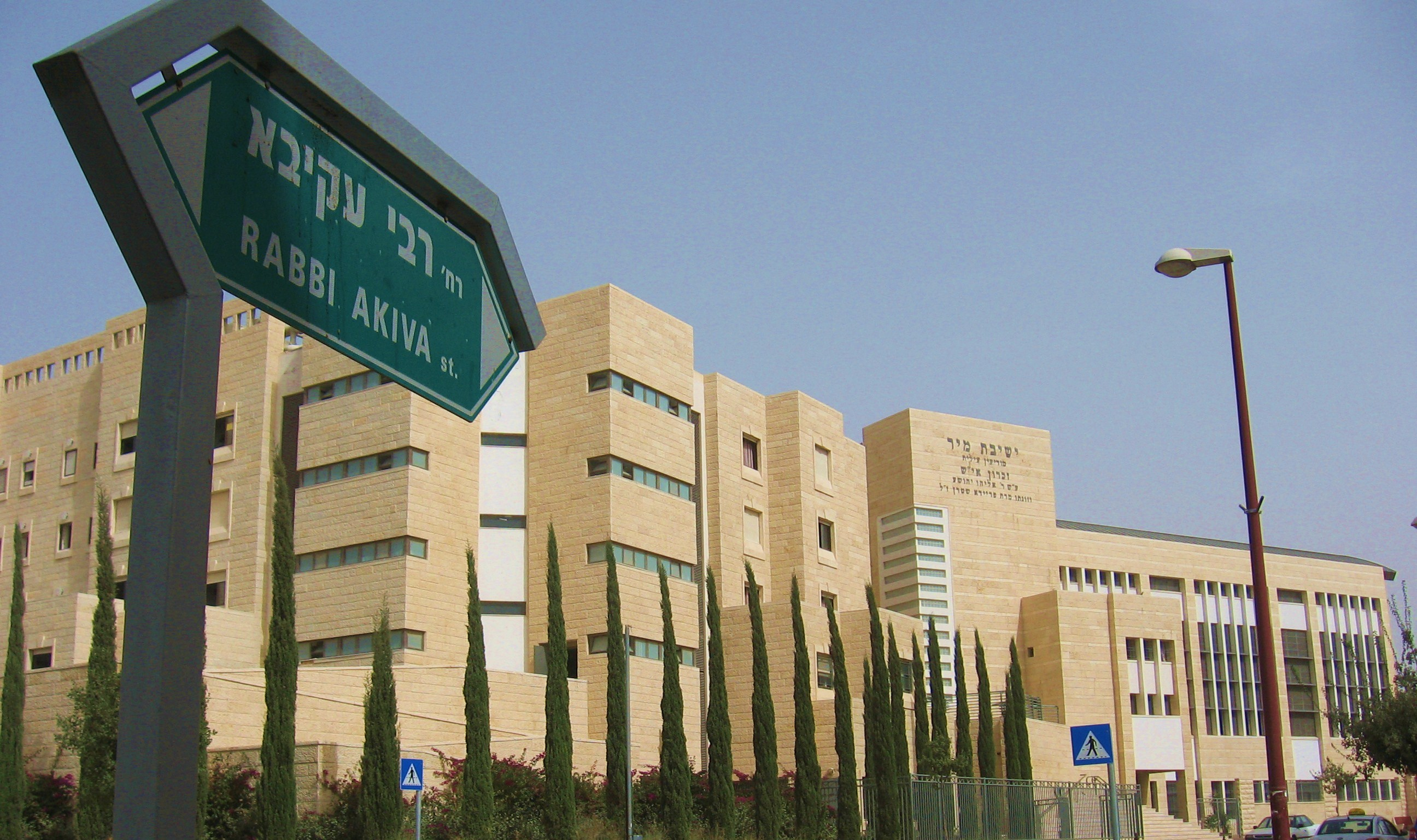 ישיבת מיר בברכפלד רח' רבי עקיבא